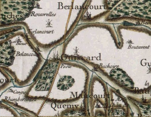 Carte de Cassini de Guiscard